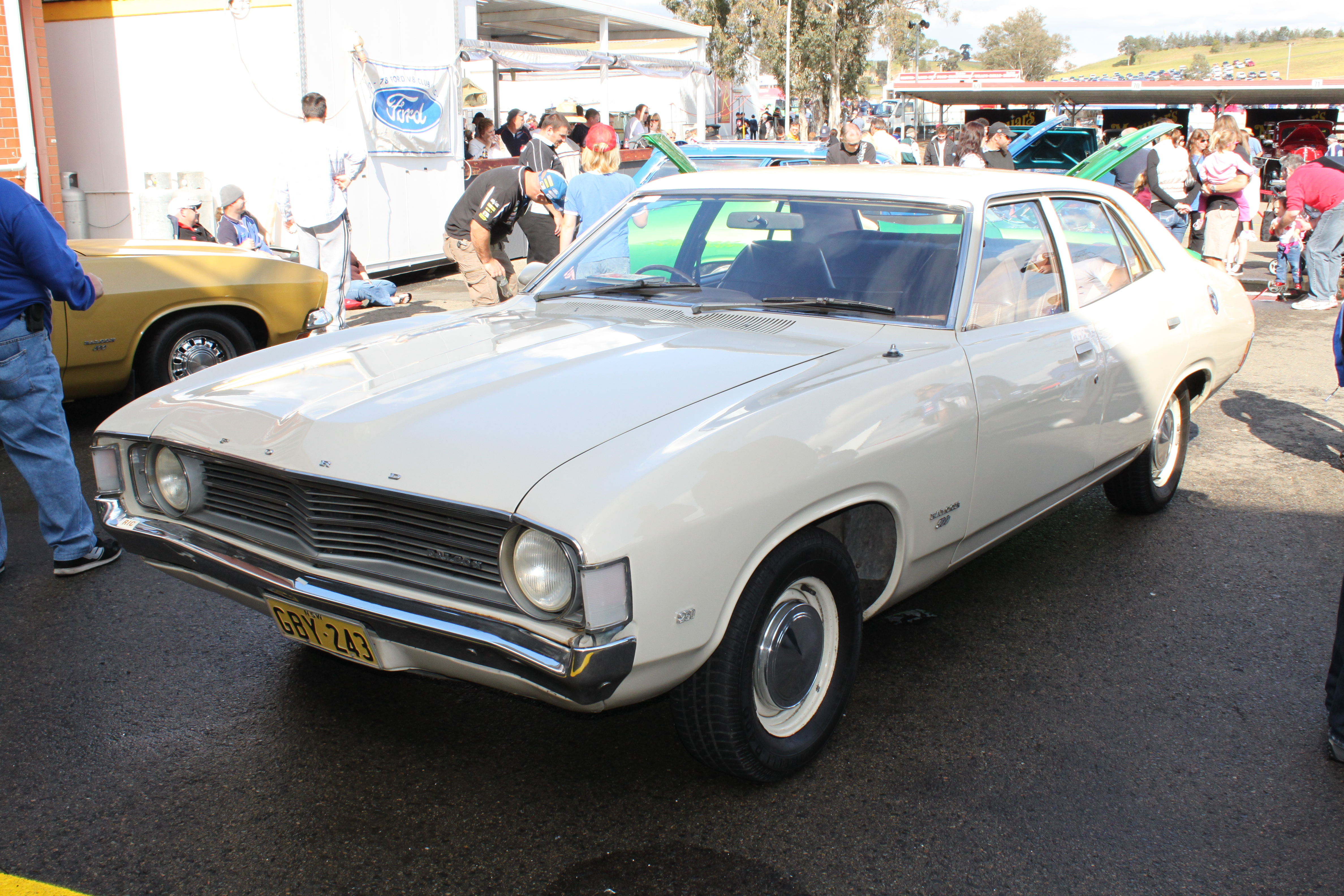 Ford Falcon XA 500